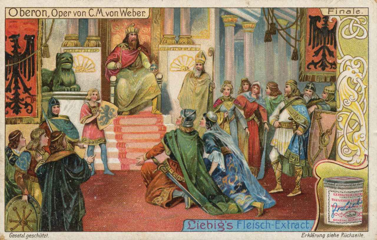 6: Finale. Oberon. Oberon ist mit Titania aufs neue vereint, da durch die unerschütterlich treue Liebe Hüons und Rezias das Gelübde erfüllt worden ist. Der Elfenkönig versetzt daher durch seine Zaubermacht jene nebst Scherasmin und Fatime nach Frankreich zurück. Hüon kniet vor Karl dem Grossen, er verkündet, dass die ihm auferlegten Bedingungen erfüllt worden seien und erhält Begnadigung.